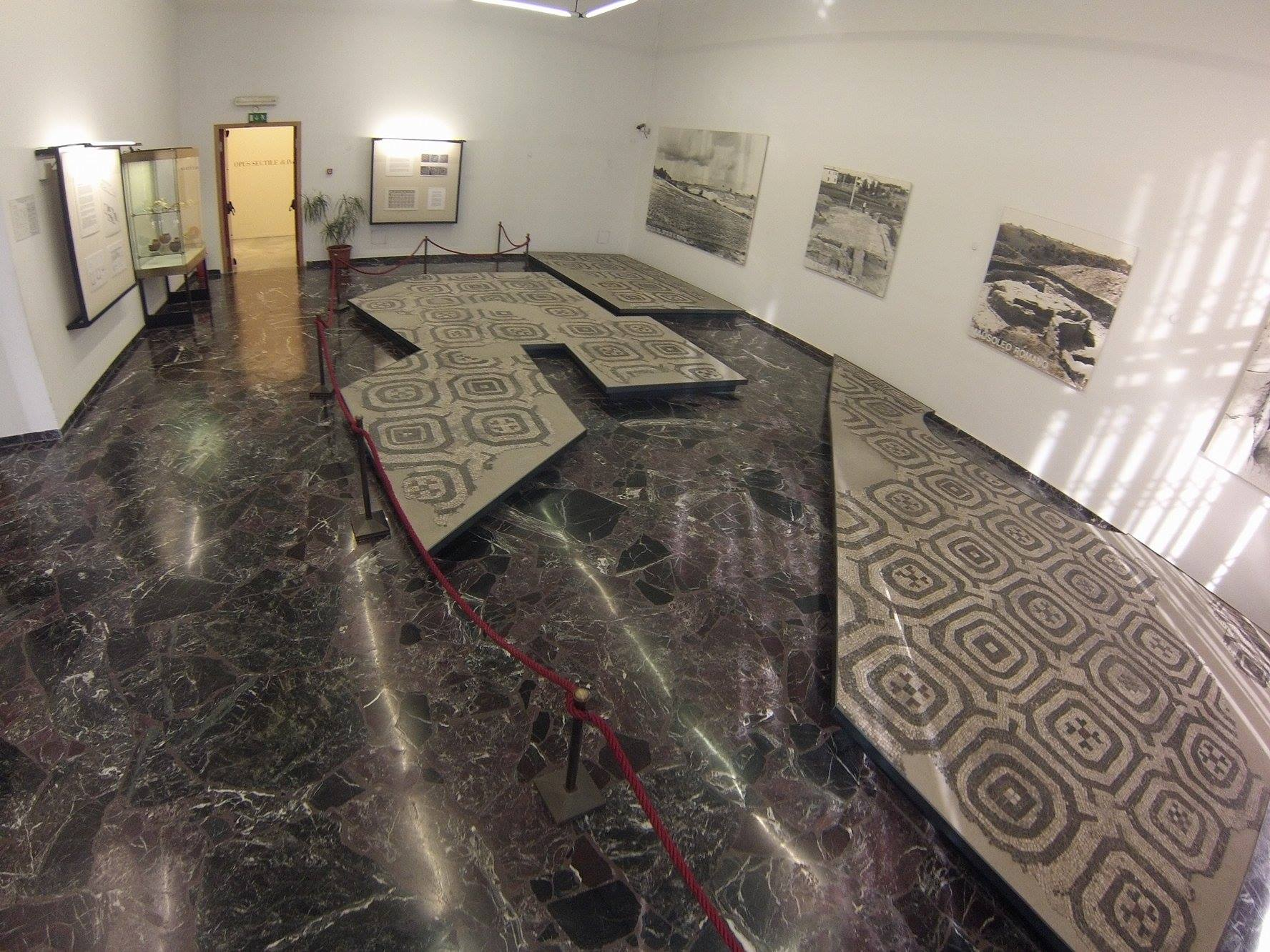 wonderful mosaic in MaMe